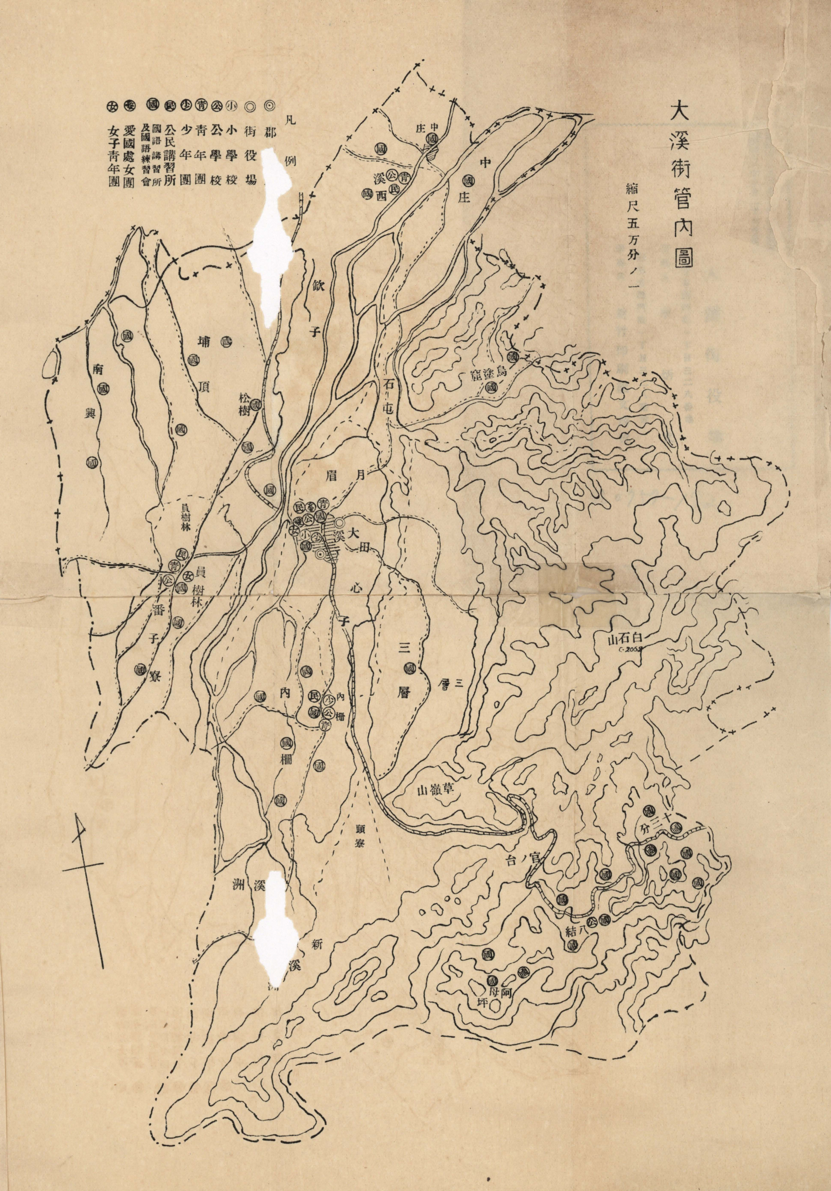 大溪街管內圖，為現今桃園市大溪區